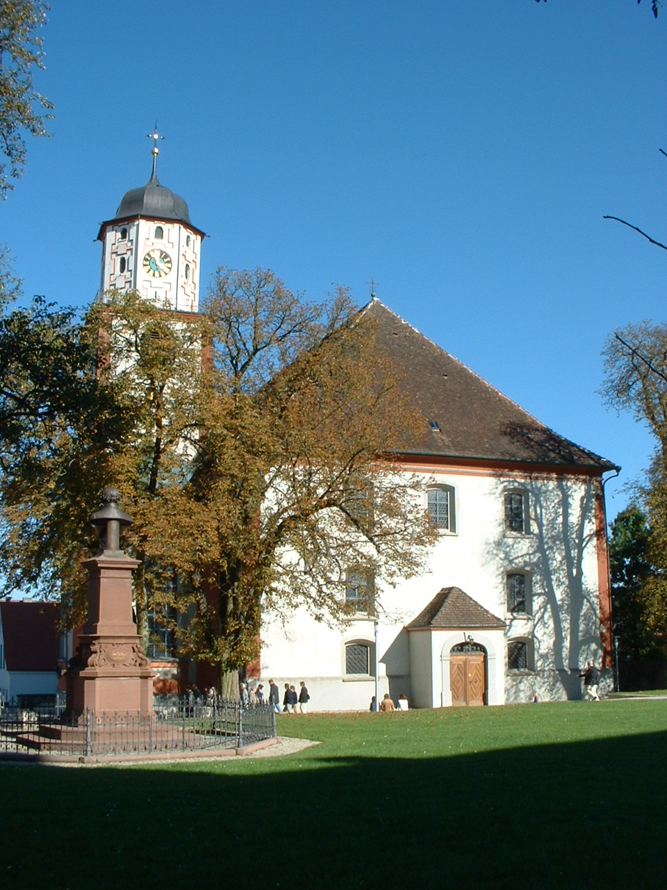 Die Stadtkirche (St. Martin) in Meßkirch. Links das Denkmal zu Ehren des 1780 in Meßkirch geborenen Komponisten Conradin Kreutzer